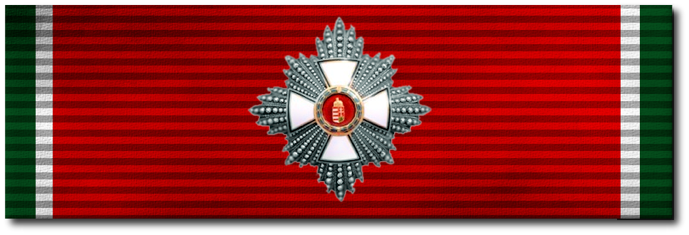 Unkarin Ansioritarikunnan 1. lk. komentajamewrkin kunniamerkkinauha (military)